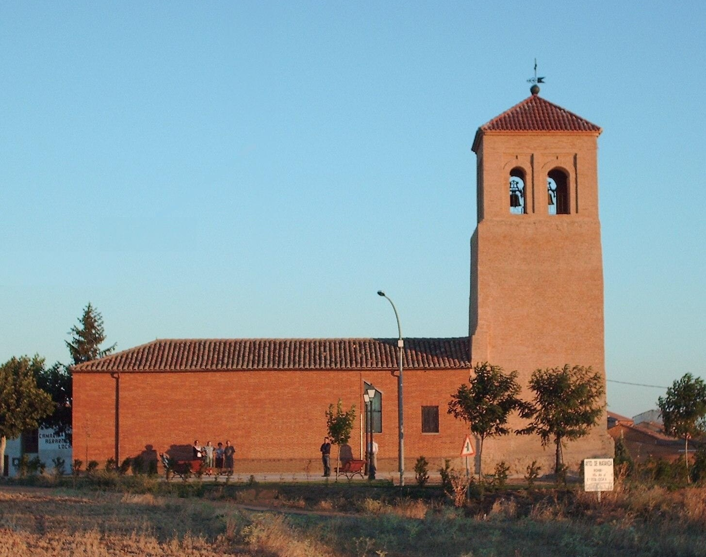 Ermita de la Virgen del Rosario en Matanza de los Oteros (León, España)